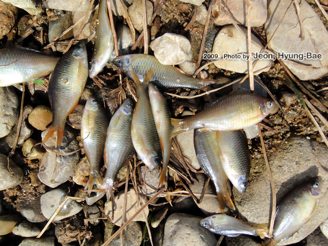 Dead Acheilognathus somjinensis&Acheilognathus koreensis because of fish trap angler.